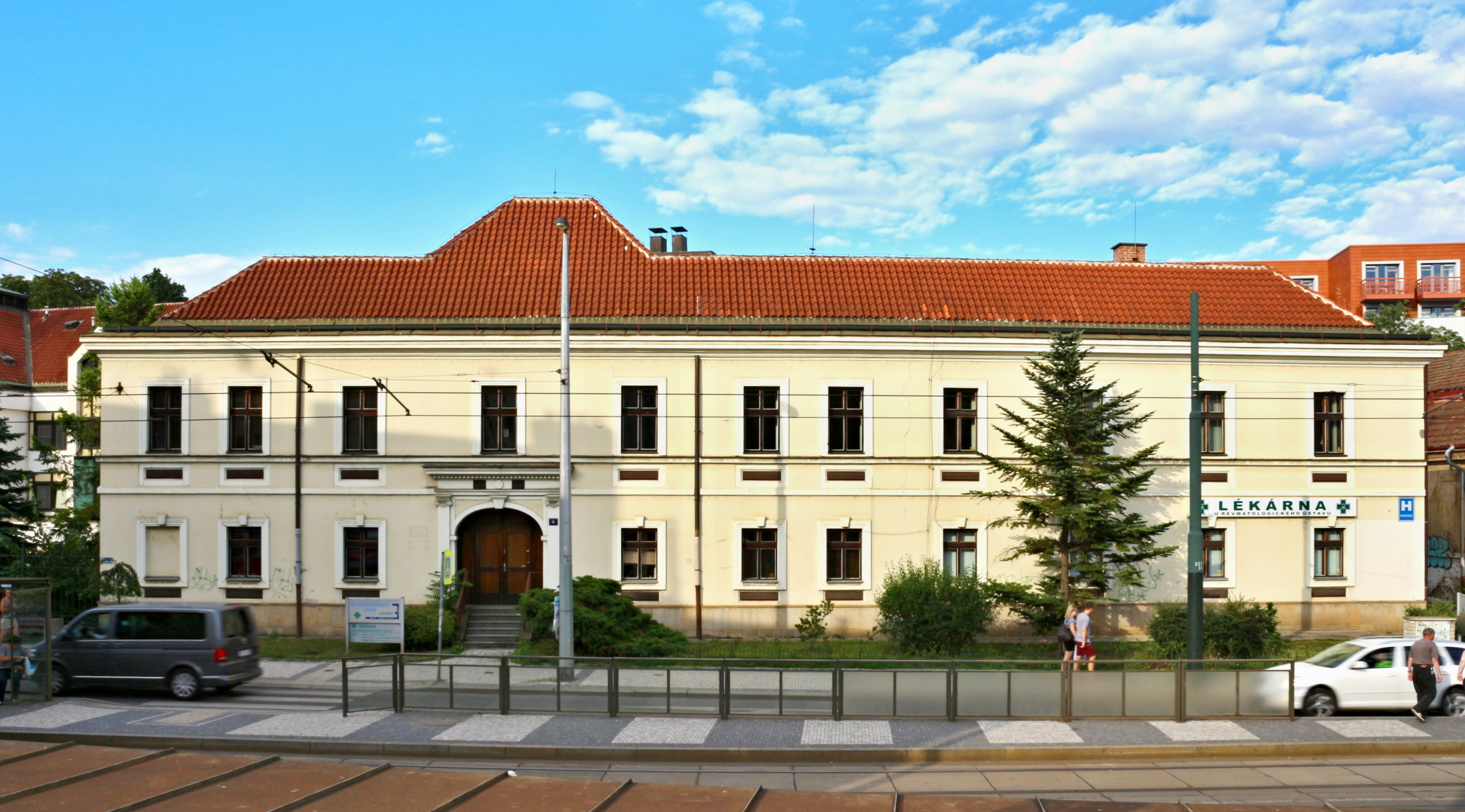 Ulice Na slupi